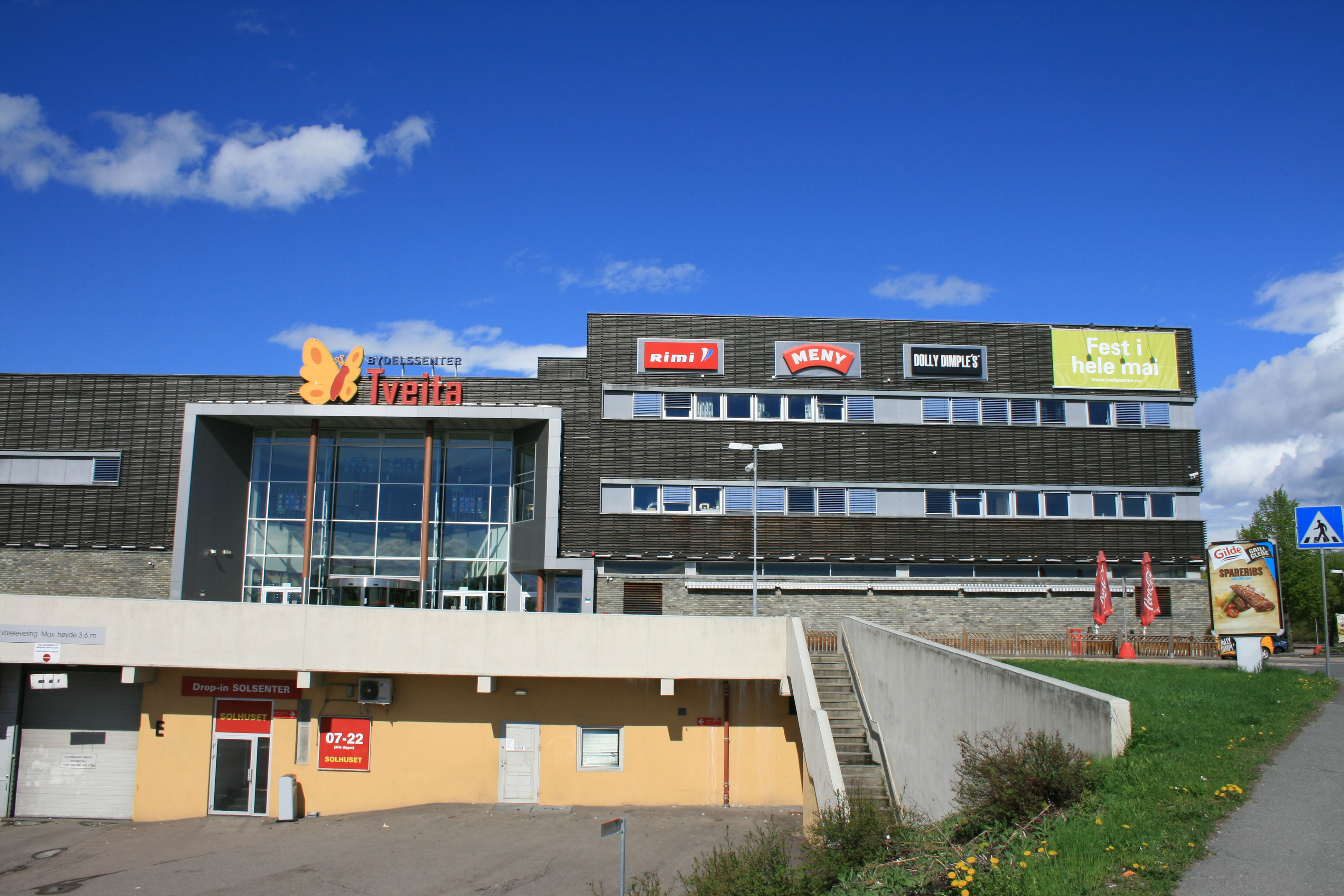 Tveita Senter ligger på grensen mellom Alna og Østensjø Bydel, i Tvetenveien 150.